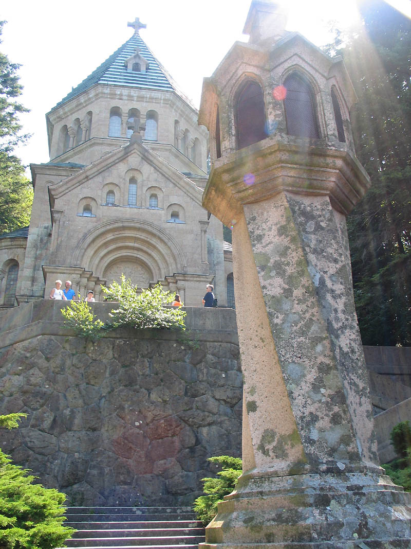 Votivkapelle in Berg am Starnberger See